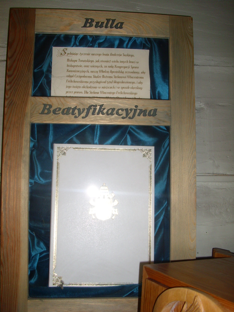 bulla